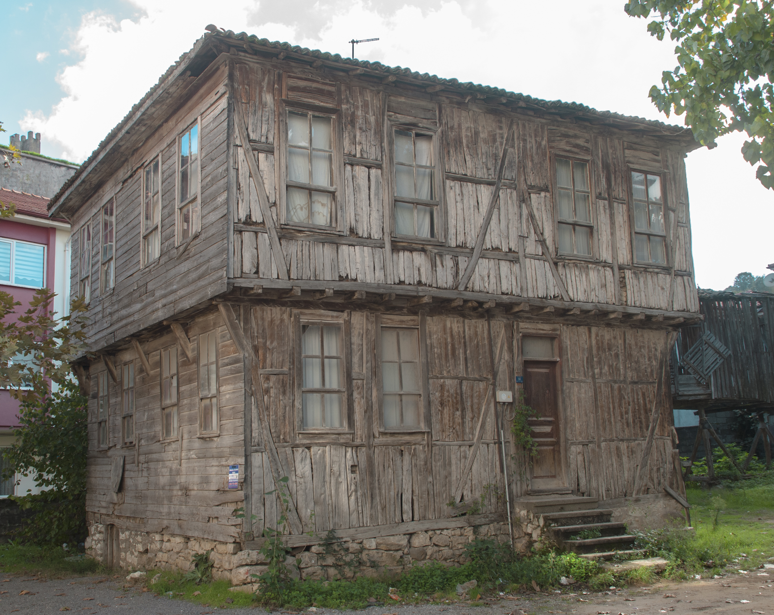 Karasu, Aziziye Mahallesinde Karadeniz usulü ahşap ev.